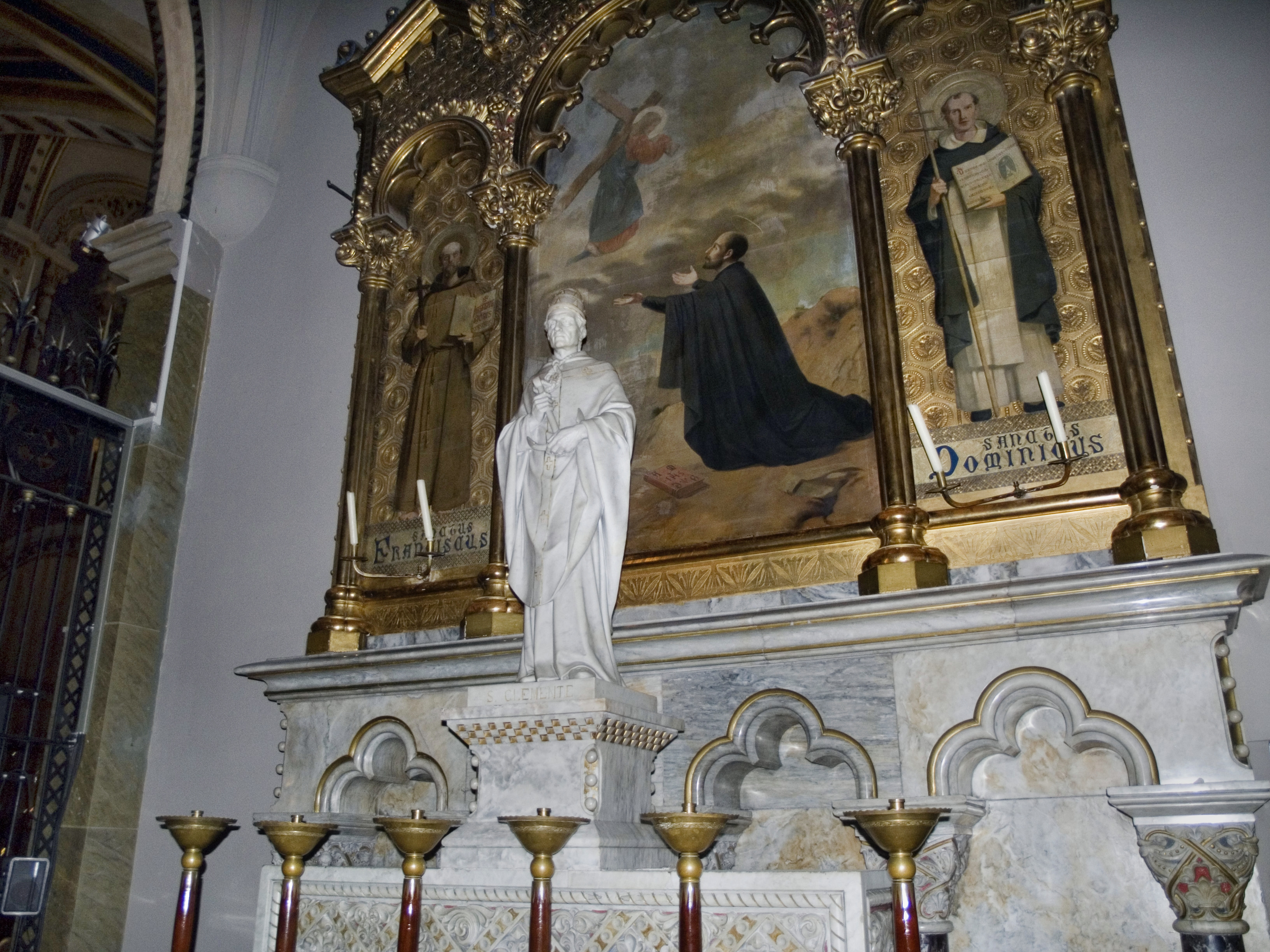 Каталония, монастырь Монсеррат – Базилика Девы Марии (часовня Святого Игнатия Лойолы)